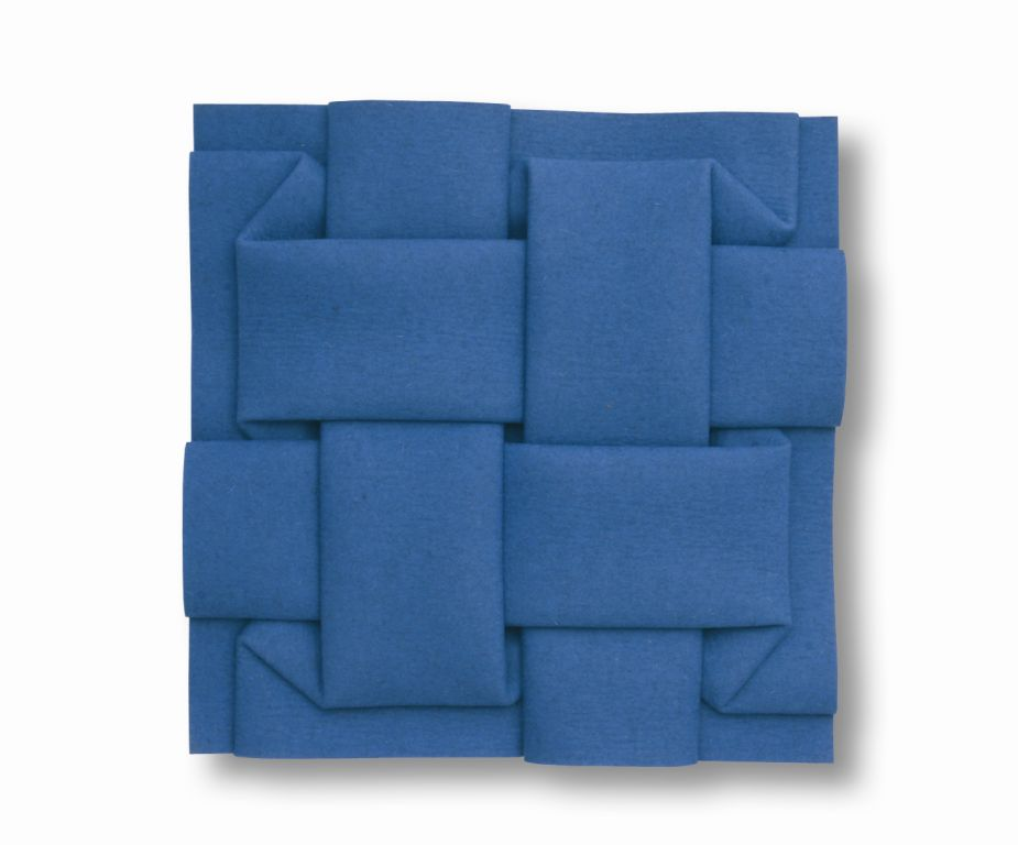 Peter Weber, Faltung Filz Cyanblau 6cm, 53 x 54 cm, 2010